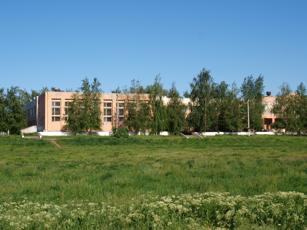 Розсошенці (біля Полтави)